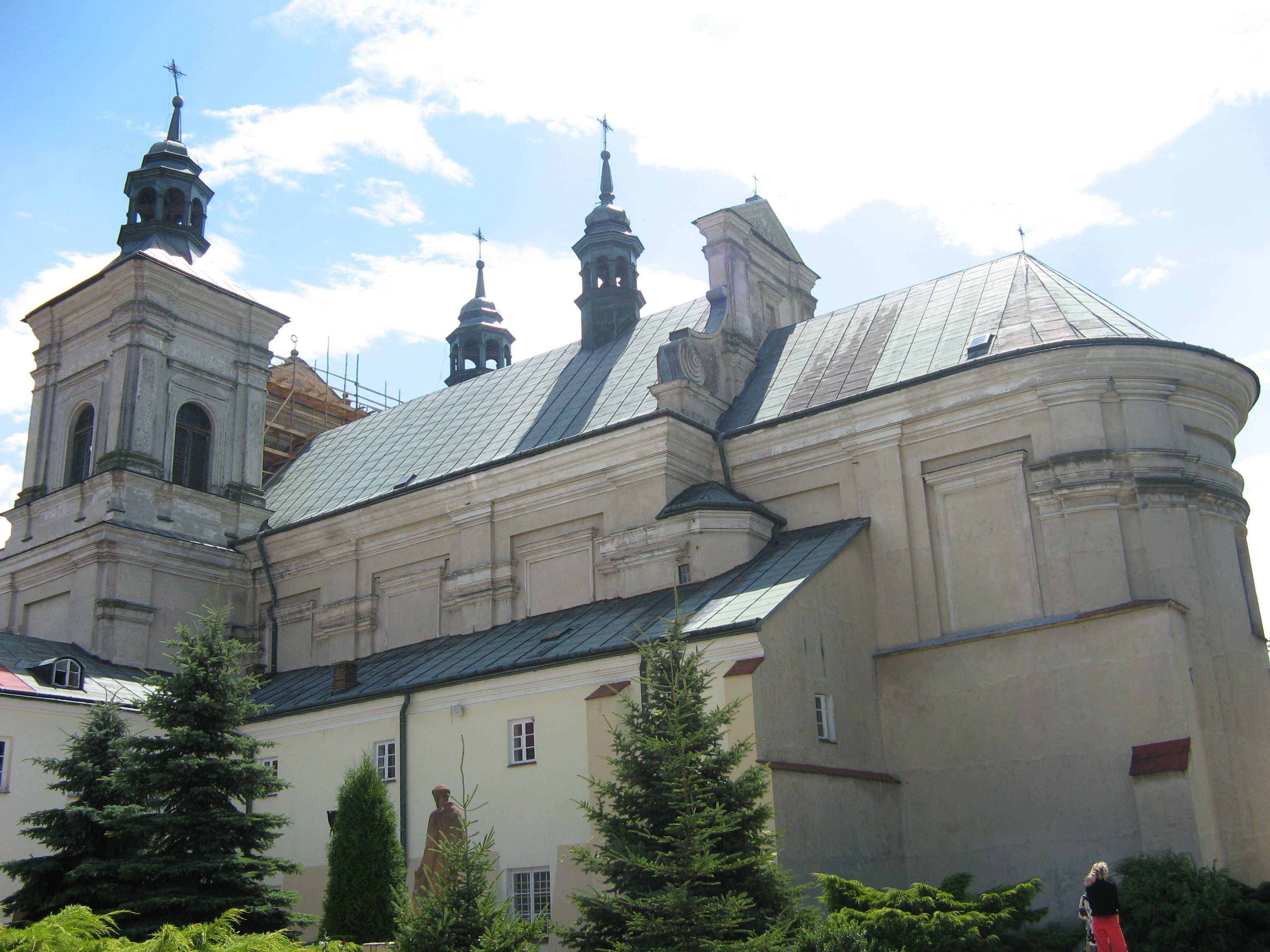 Radecznica - kościół pod wezwaniem św. Antoniego (zabytek nr rejestr. A/187)